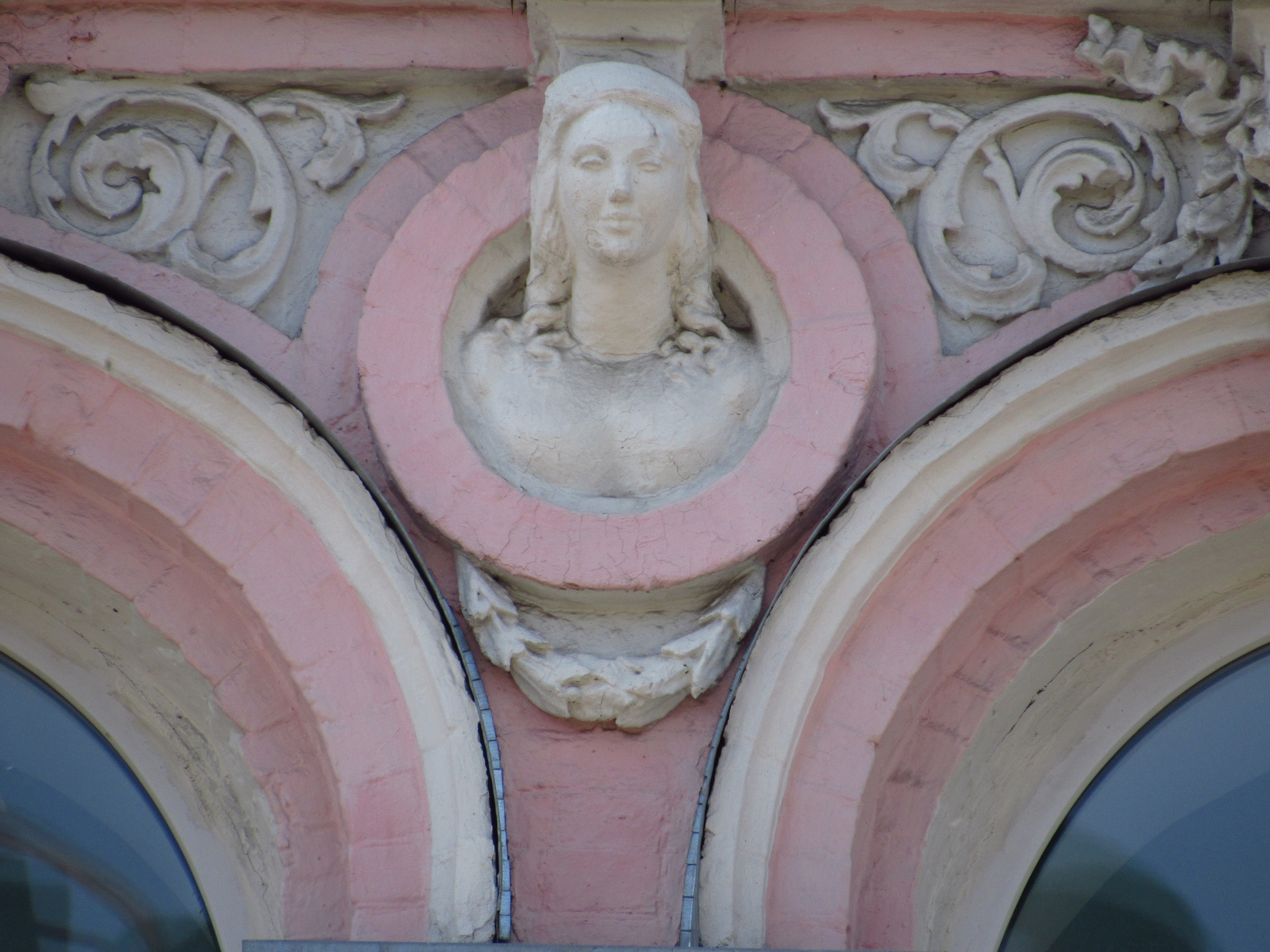 Будинок прибутковий, Київ, Толстого Льва вул., 1